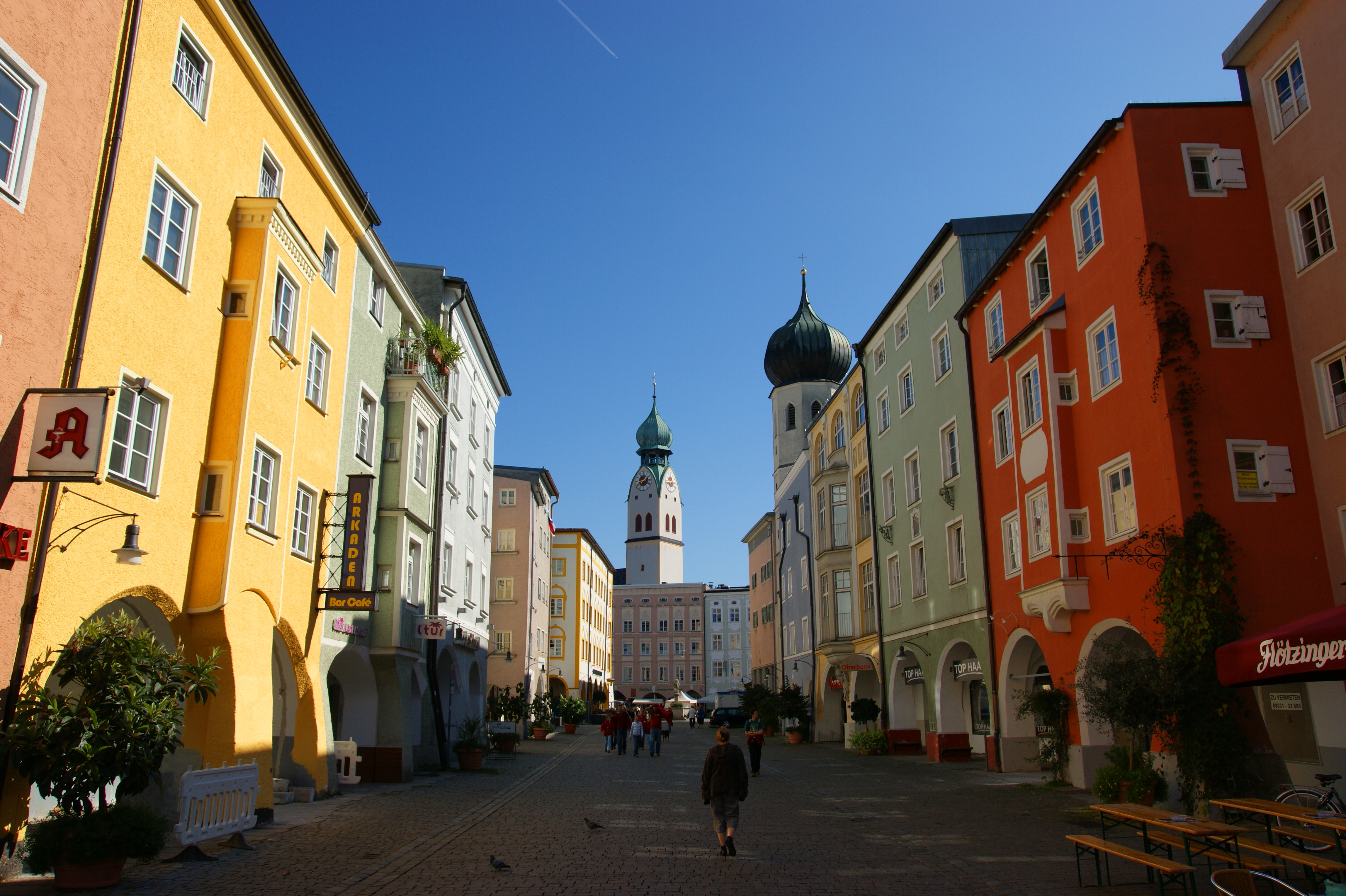 Heilig Geist Str Rosenheim